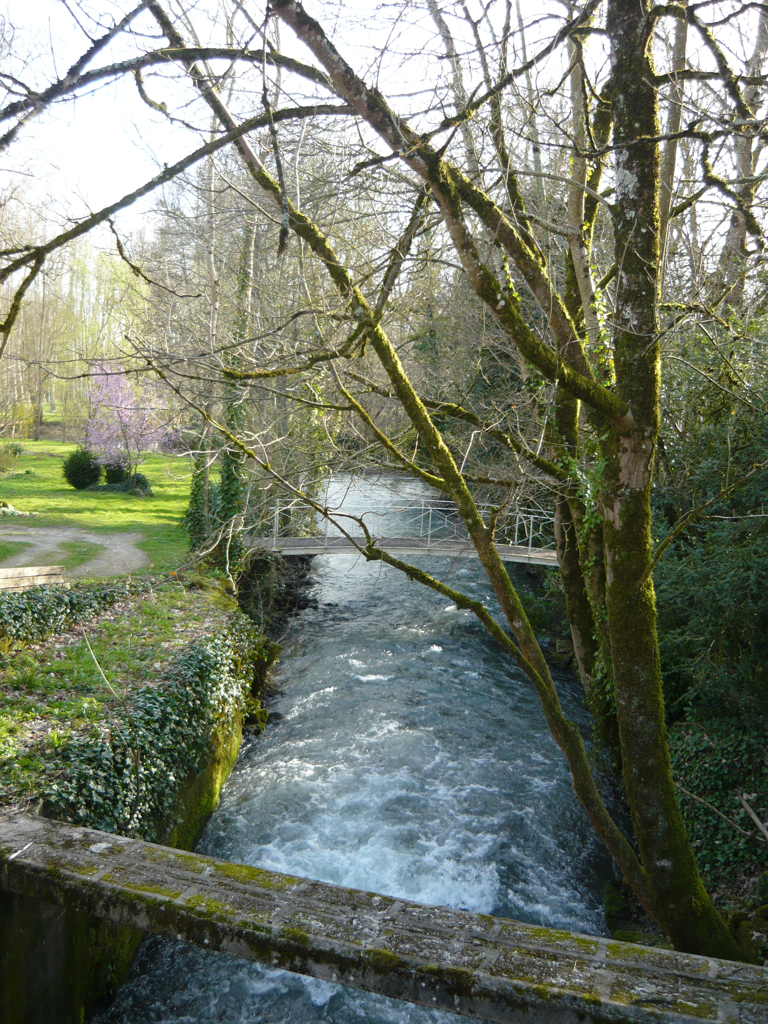 La rivière Boutonne dans le village de Dampierre-sur-Boutonne à la fin de l'hiver.